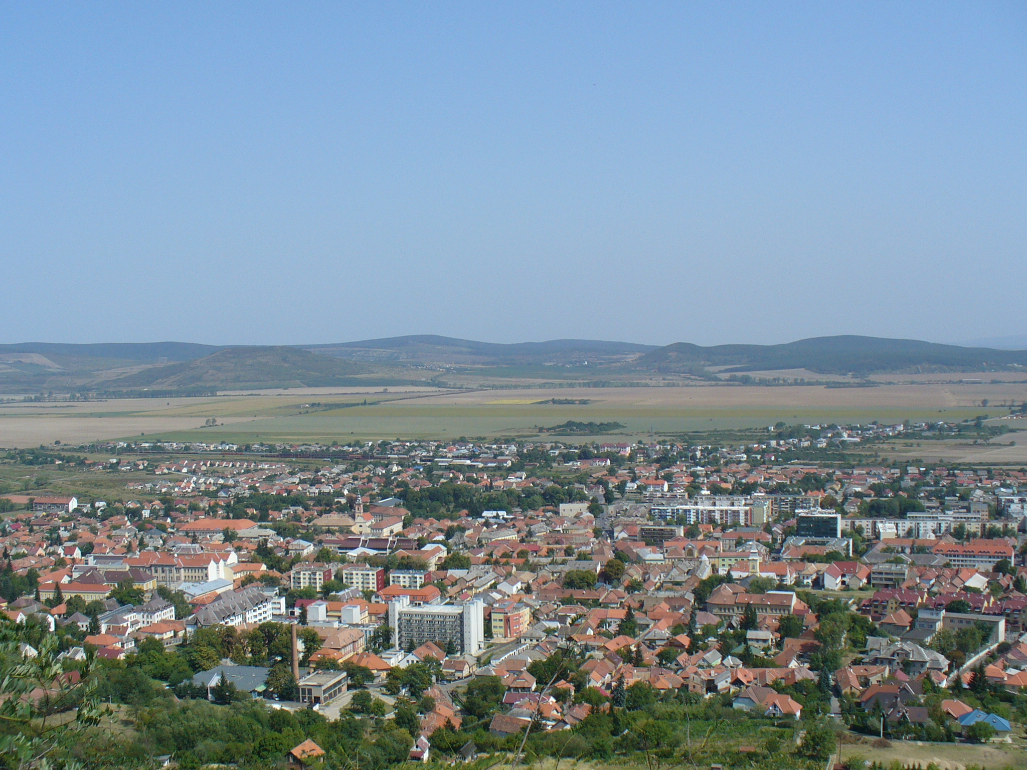 Sátoraljaújhely, w północnej części dawna dzielnica - Kisújhely, obecnie Słowackie Nowe Miasto na Słowacje